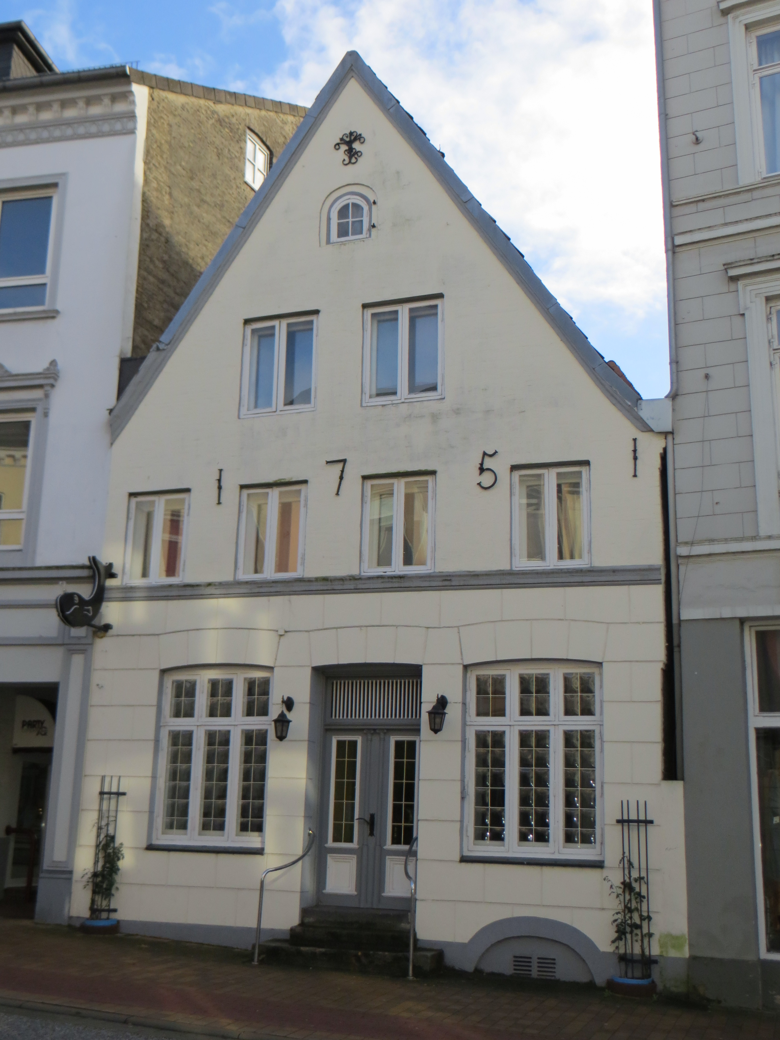 Gasthaus Schwarzer Walfisch, Angelburger Straße 44, Bild 01